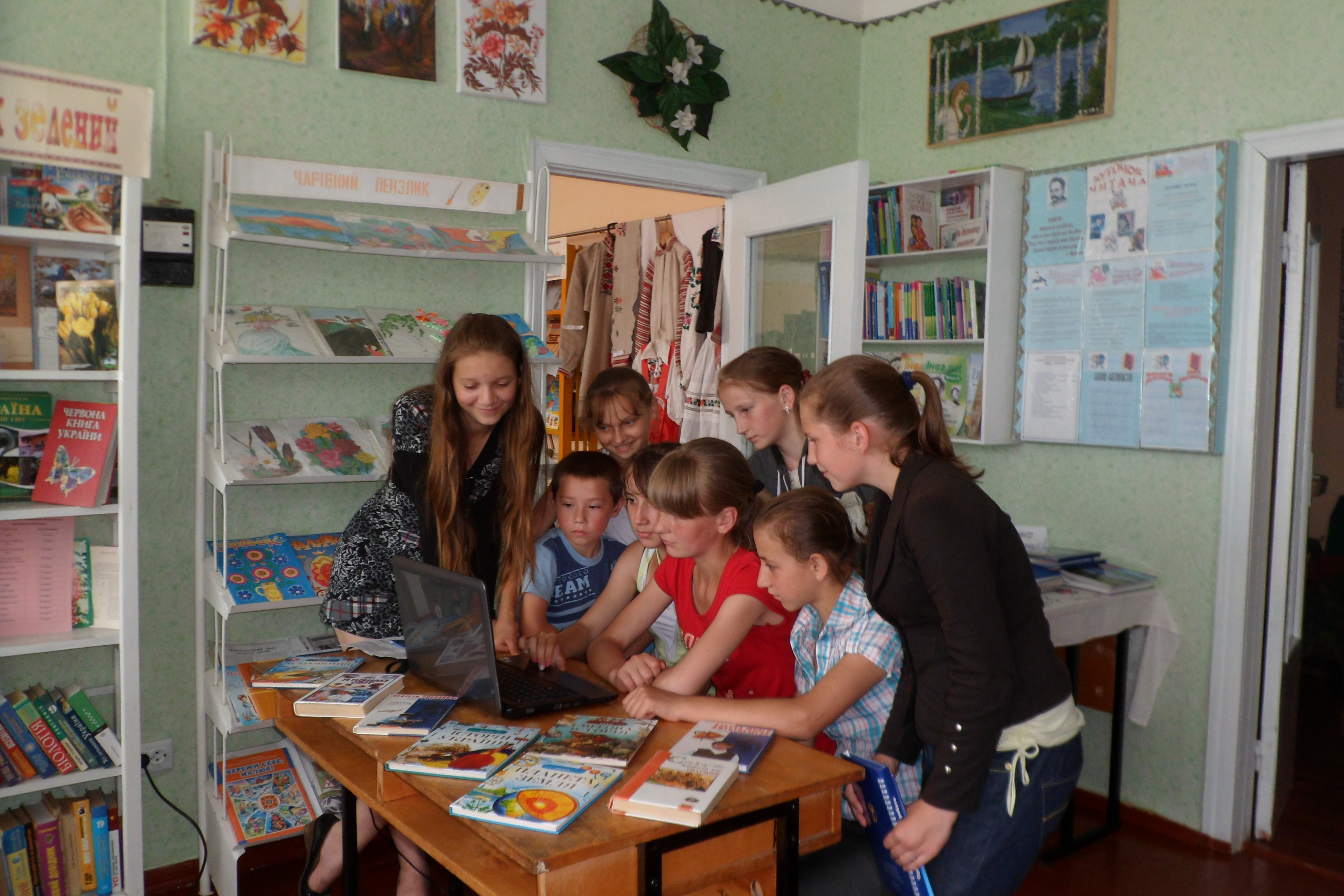 Хвилинки цікавинки